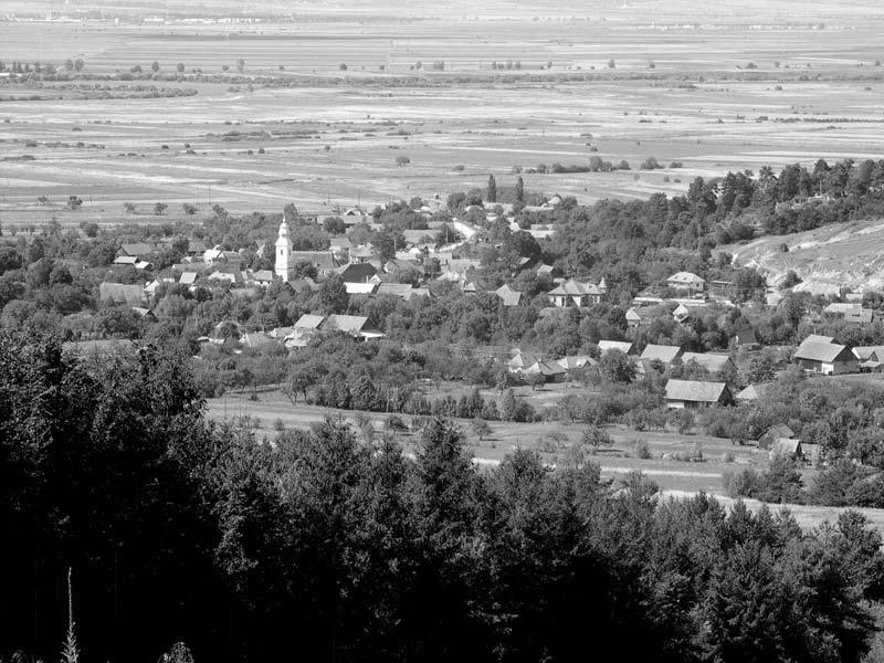 Lisznyó, Kovászna megye